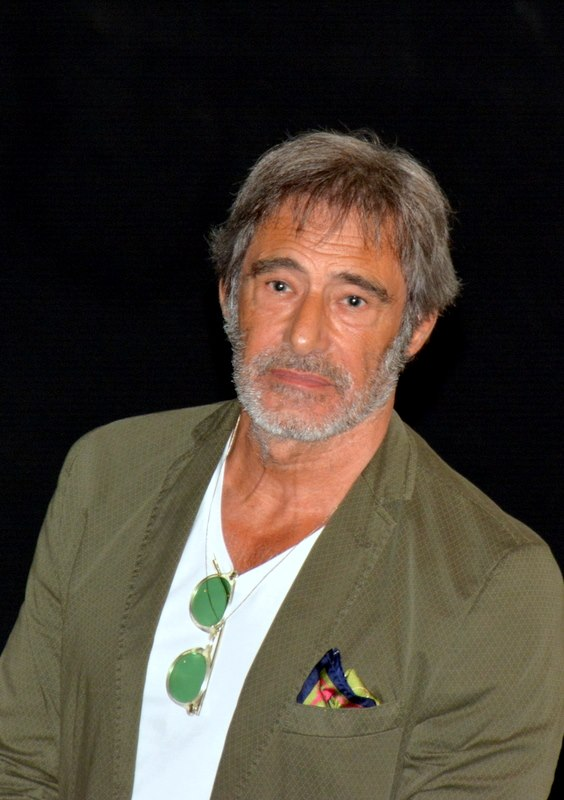 Gérard Lanvin à l'avant-première de "Bon rétablissement"